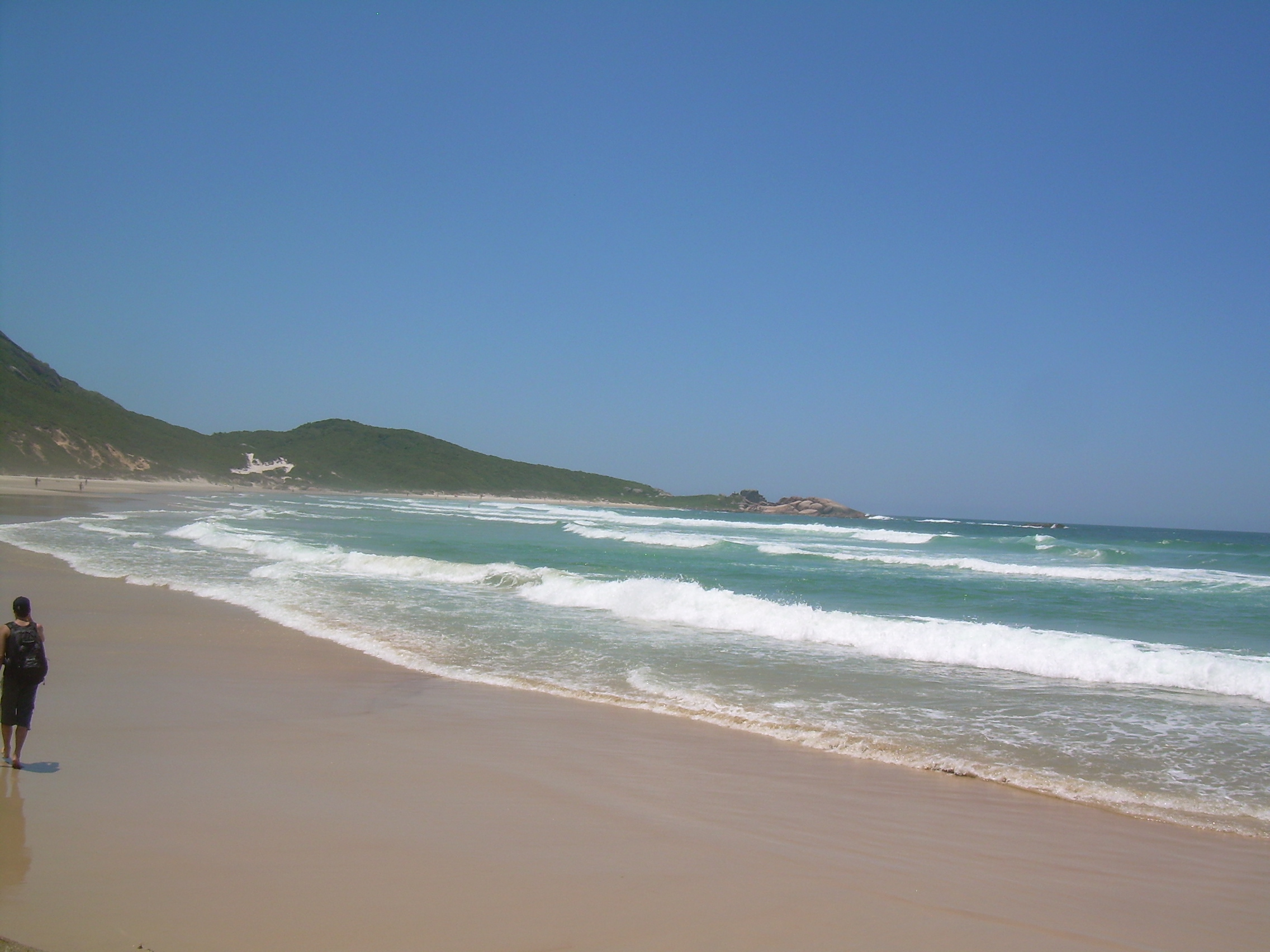 Praia de nudismo em Floripa. Galheta.